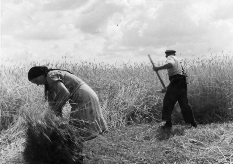 bei Oranienburg, Roggenfeld wird mit Sense gemäht Zentralbild/Dreyer Juli 1949. Roggenernte im Kreis Oranienburg, Bezirk Potsdam.